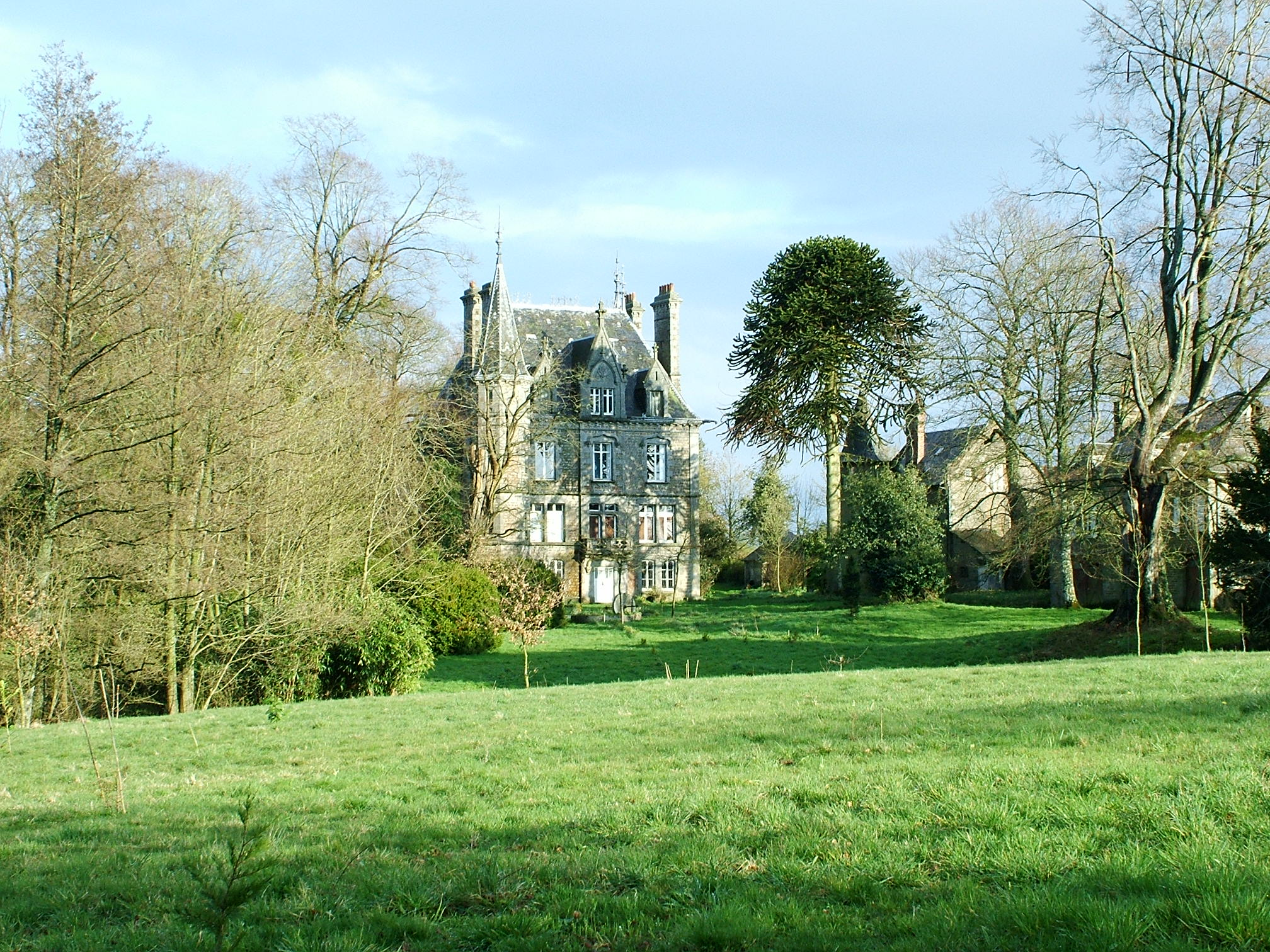 Château des Hayes, vue de la façade ouest Château de style néo-gothique, datant des années 1870. Sur la droite de la photo, restes de l'ancien manoir des Hayes datant du XVIe siècle. Commune de : La Carneille (Orne)